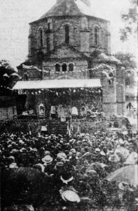 Le pèlerinage de la Peinière du 8 septembre 1938 : la foule des fidèles devant la chapelle